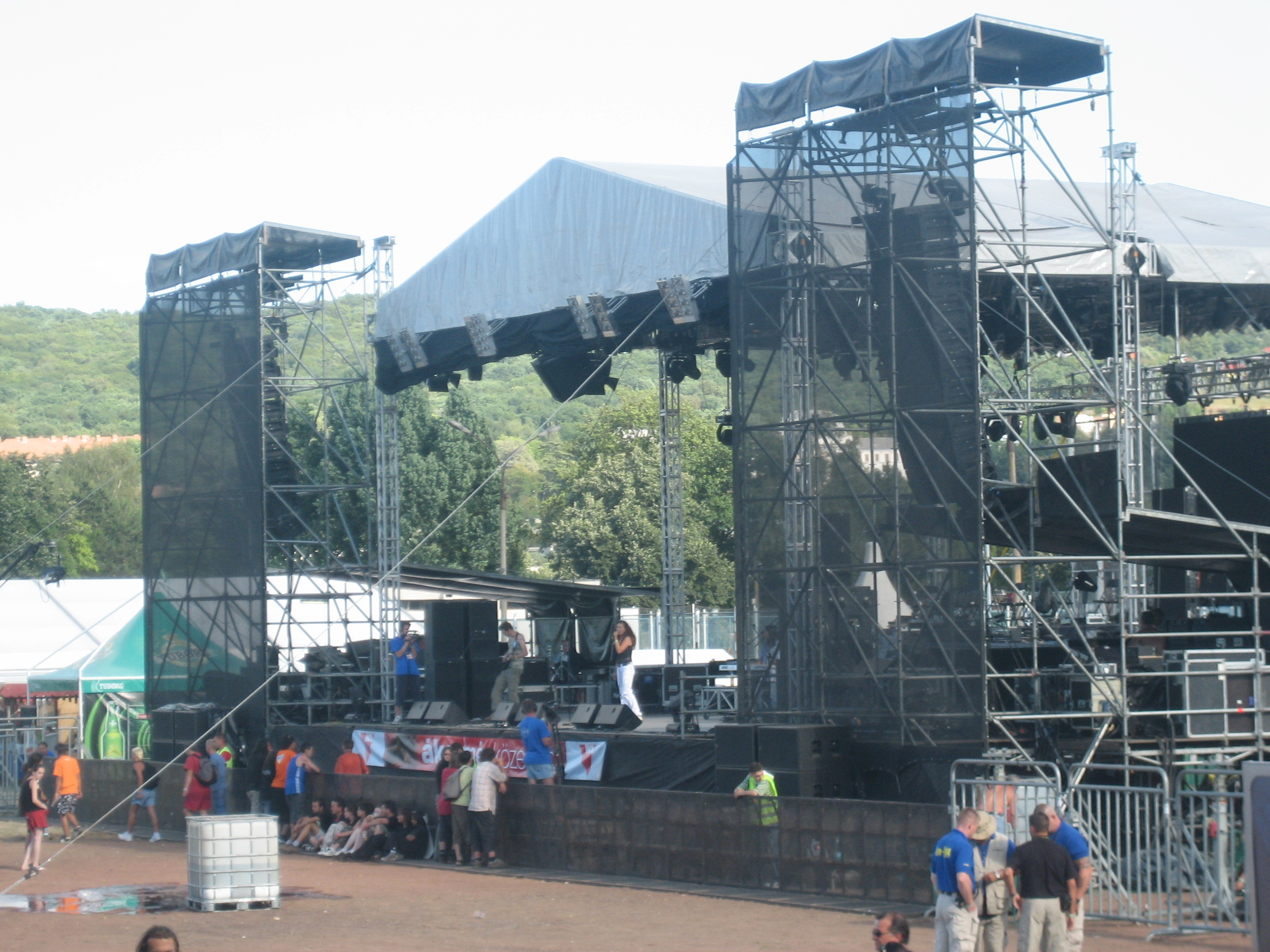 A marosvásárhelyi Félsziget Fesztivál egyik színpada